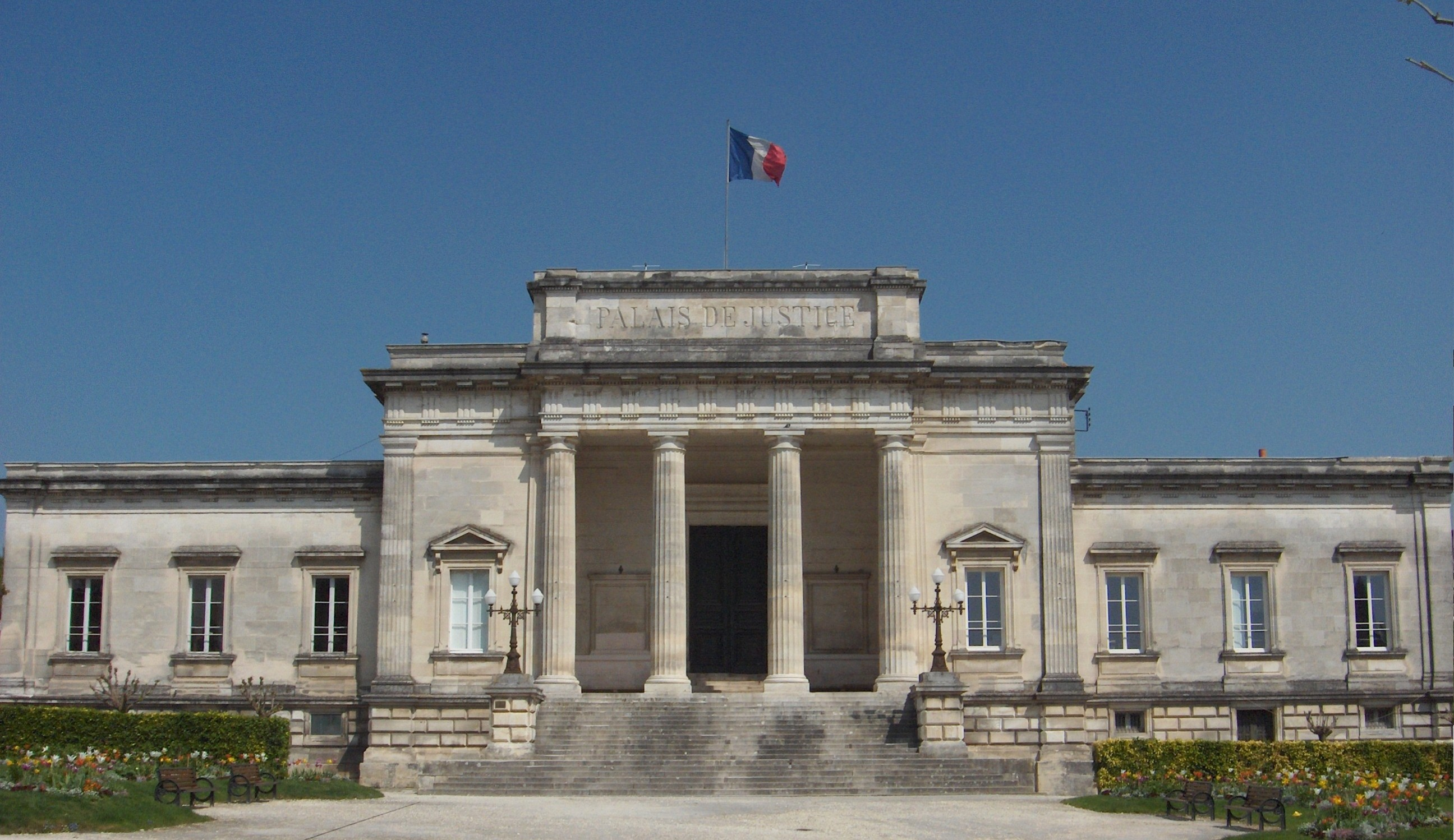 Palais de justice de Saintes, Charente-Maritime, France